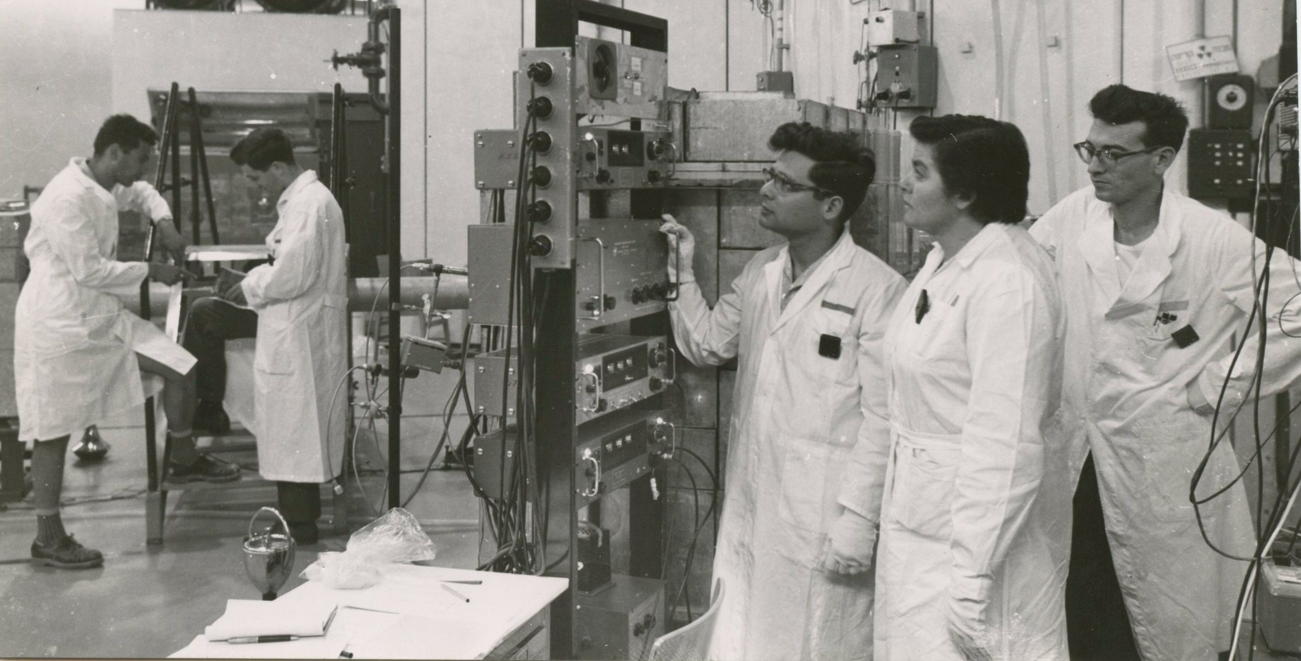 מדענית הגרעין אביבה גלעדי, חוקרת בטכניון, בעת עבודה עם קולגות במרכז למחקר גרעיני בנחל שורק